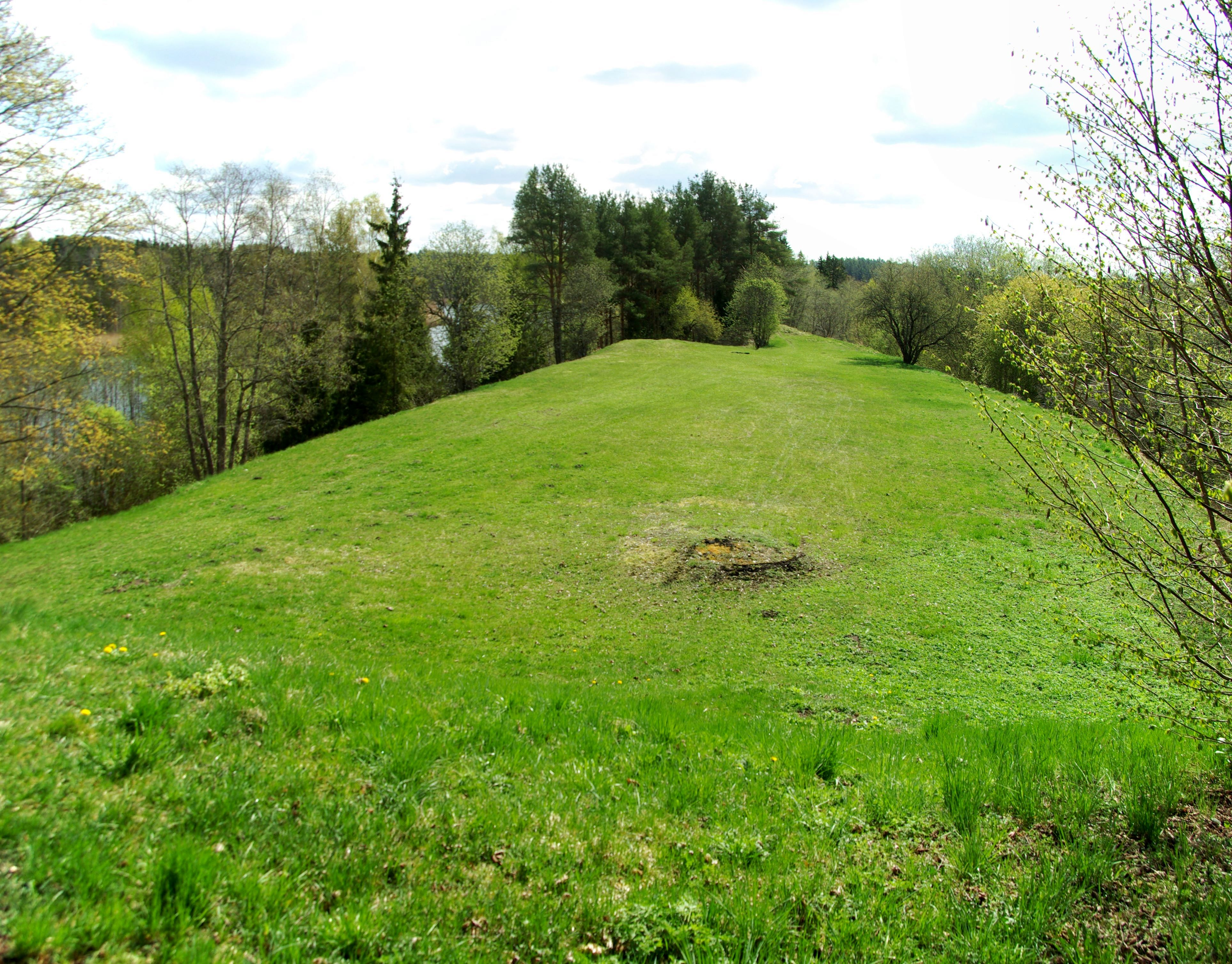 Linnus